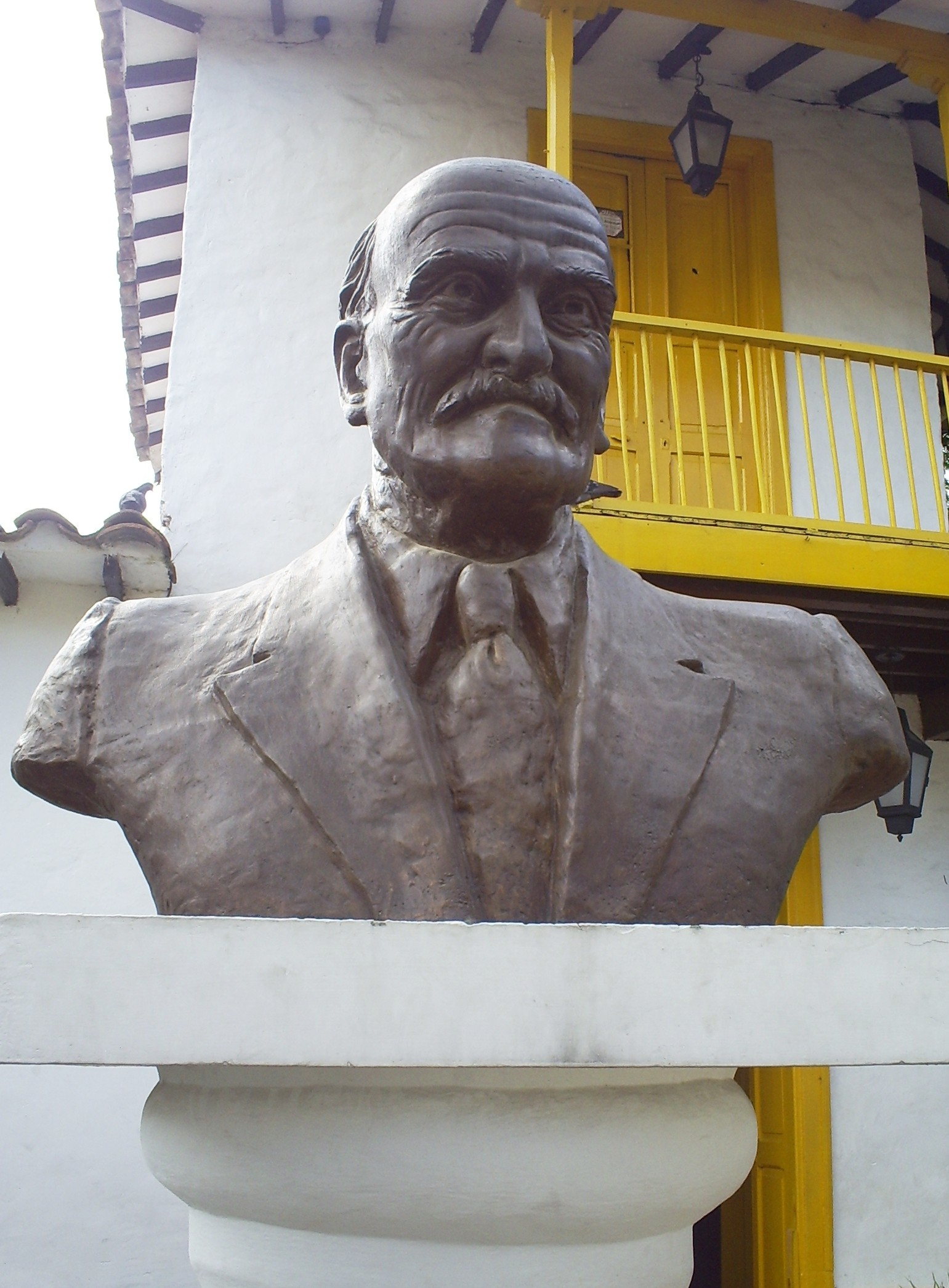 Pueblito Paisa, Medellín, Colombia.